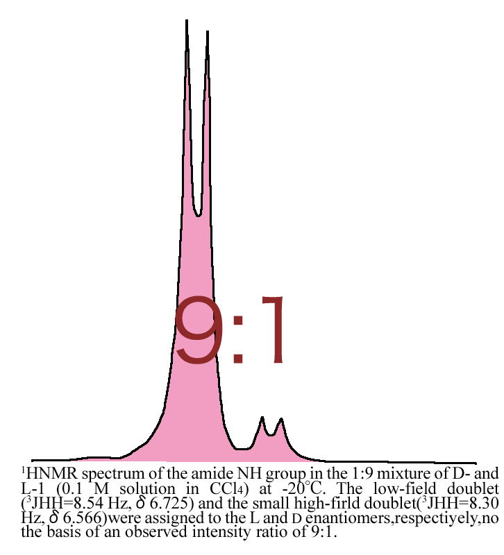 鏡像過剰率とNMRスペクトルピークの面積比